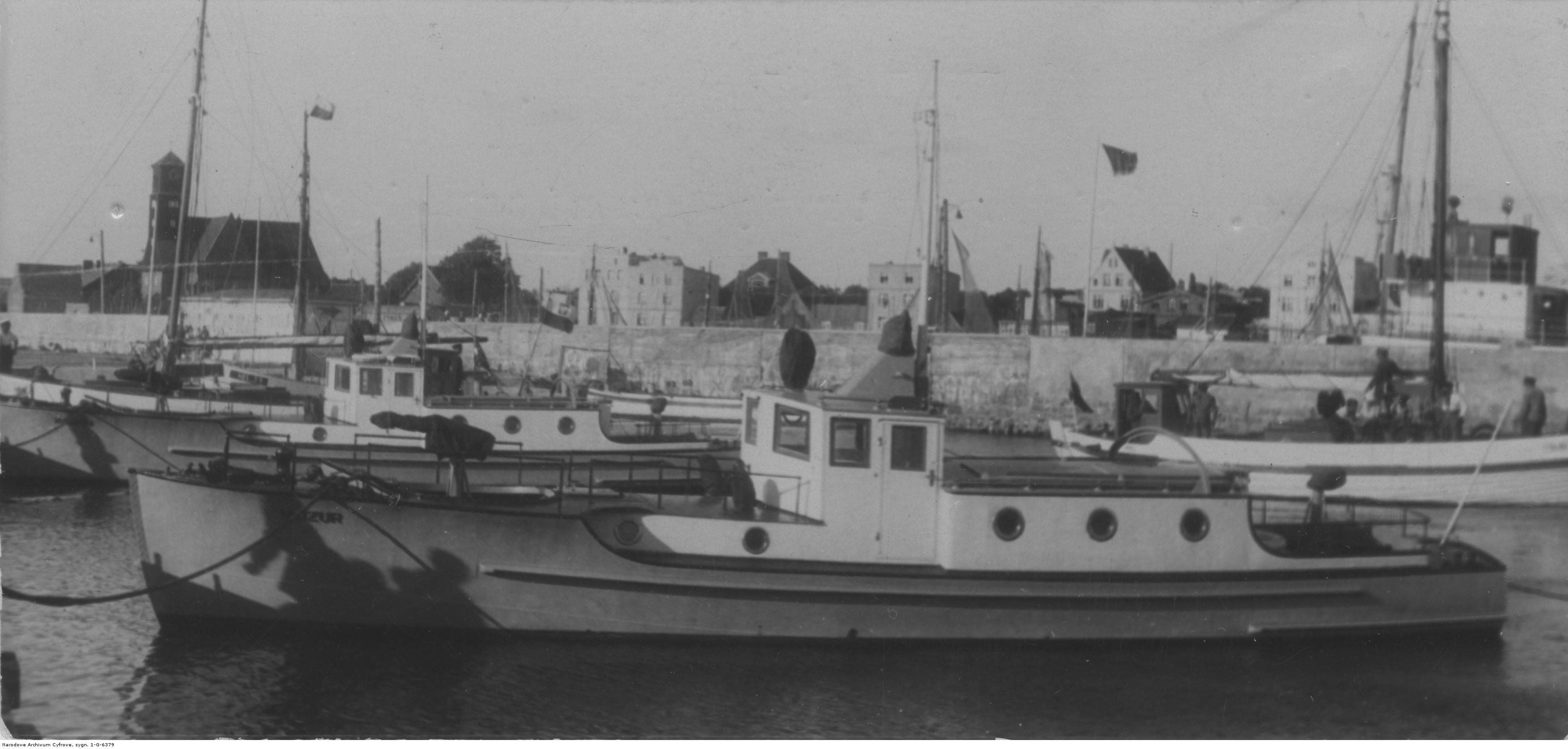 Kuter pościgowy Straży Granicznej "Mazur" w porcie w Helu. Koncern Ilustrowany Kurier Codzienny - Archiwum Ilustracji. Sygnatura: 1-G-6379